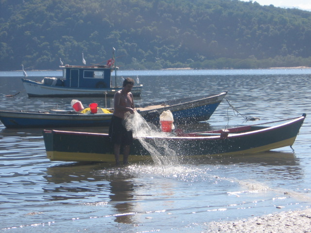 Foto de pessoas pescando na Praia das Pedrinhas, no bairro Boa Vista, São Gonçalo/RJ